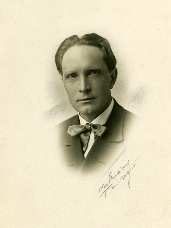 Anders Underdal